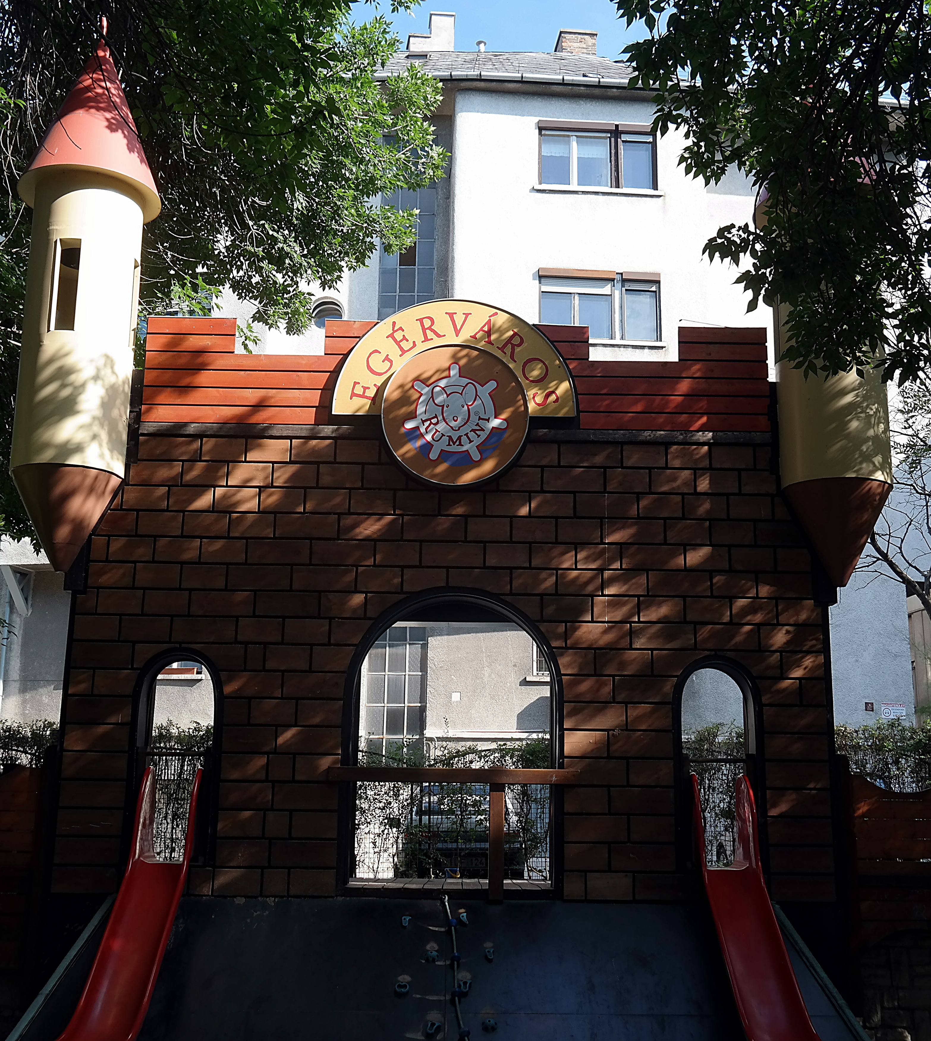 Rumini játszótér Egérváros (Budapest, I. kerület, Mária tér)